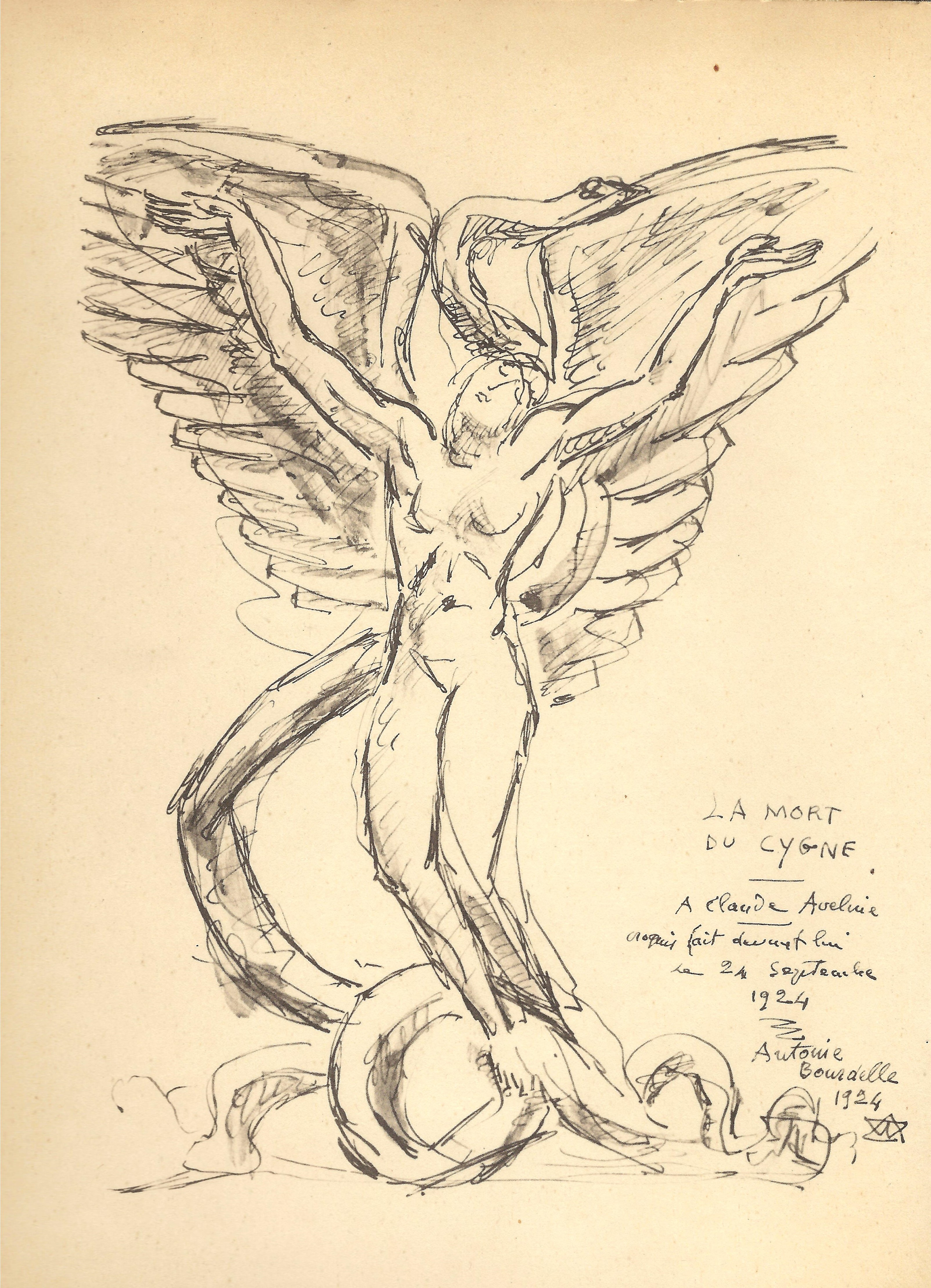 Dessin d'Antoine Bourdelle (1861-1929) reproduit dans le livre de Claude Aveline, "Les Muses mêlées", publié en 1926.